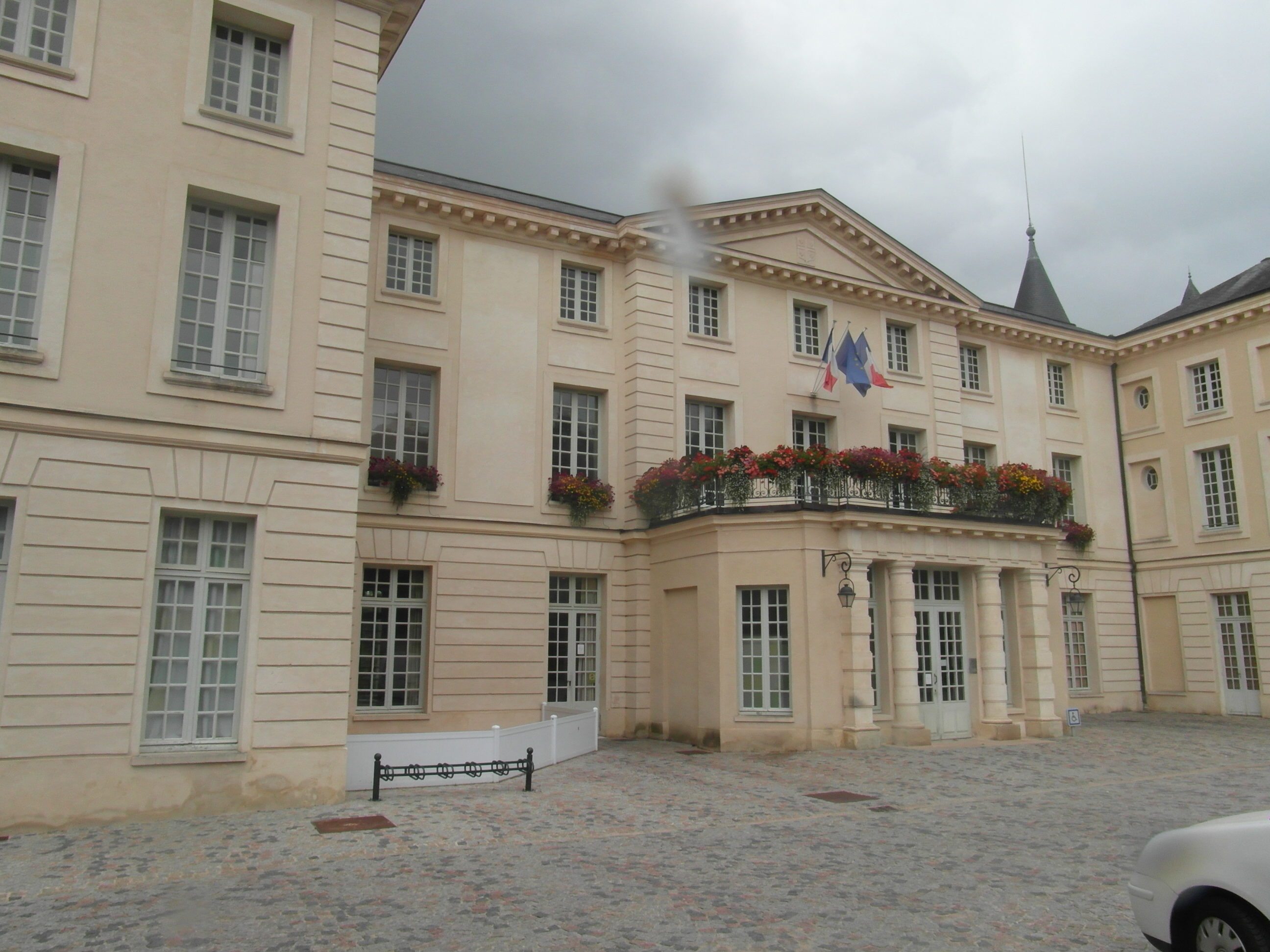 Mairie de Boissise-le-Roi (Seine-et-Marne)